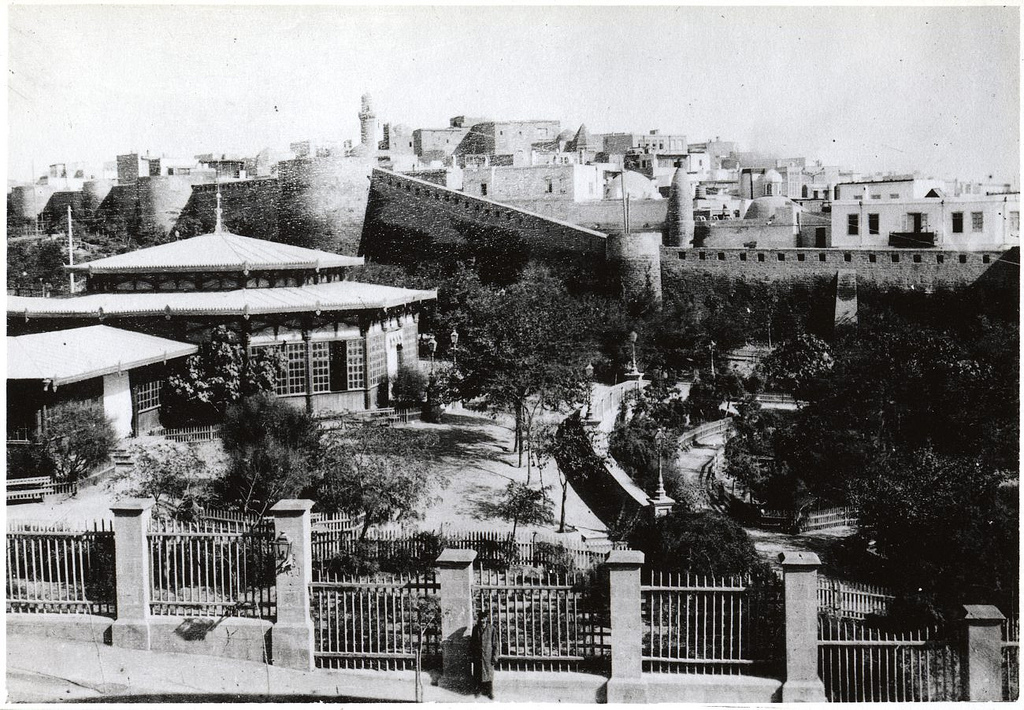 Баку. Конец 19-го века